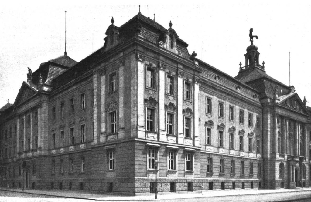 Regierungsgebäude Frankfurt (Oder) 1906 Ansicht an der Großen Scharrnstraße und der Regierungsstraße